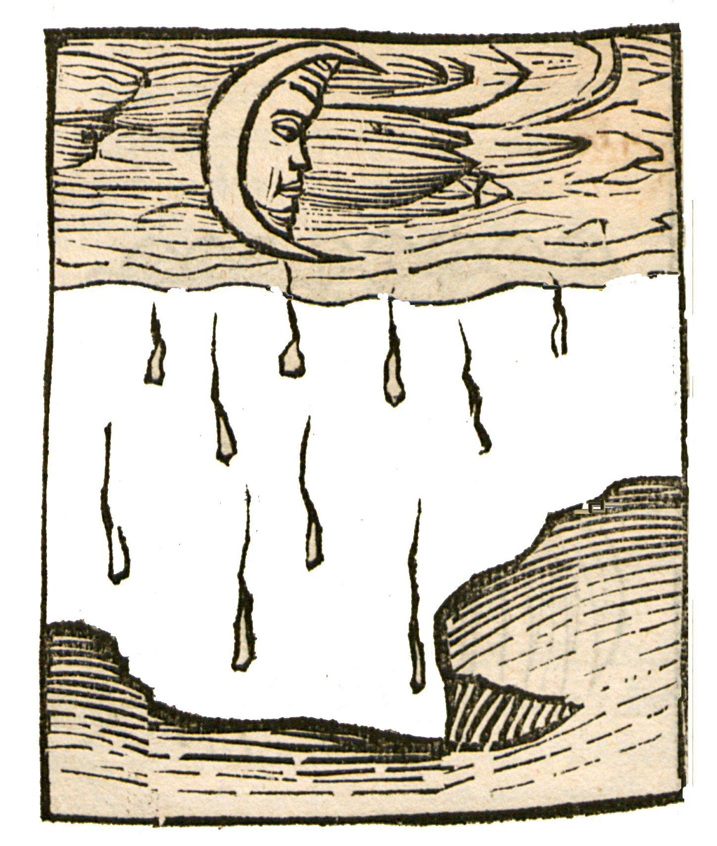 Abbildung zum Kapitel Maientau